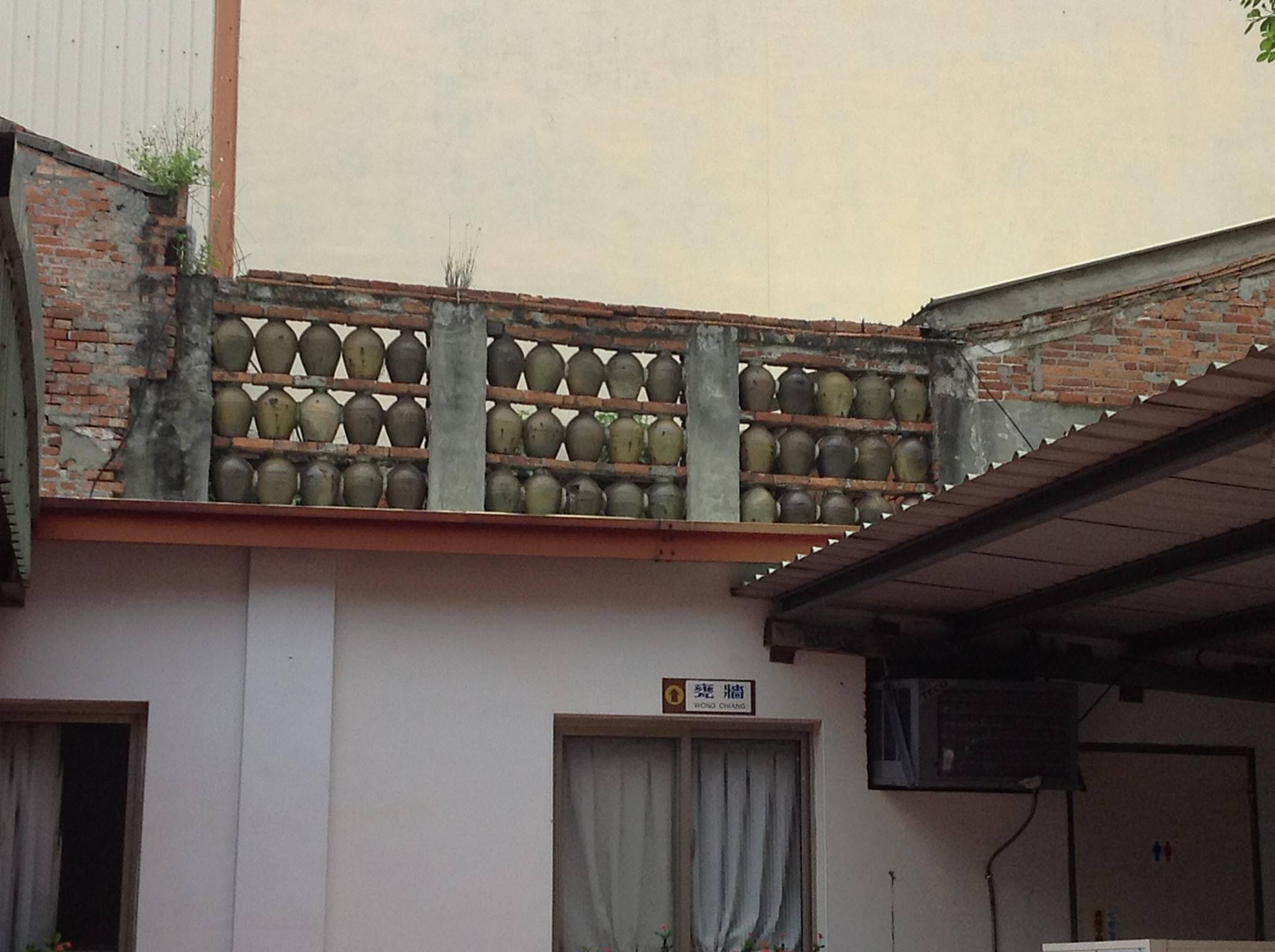 鹿港甕牆